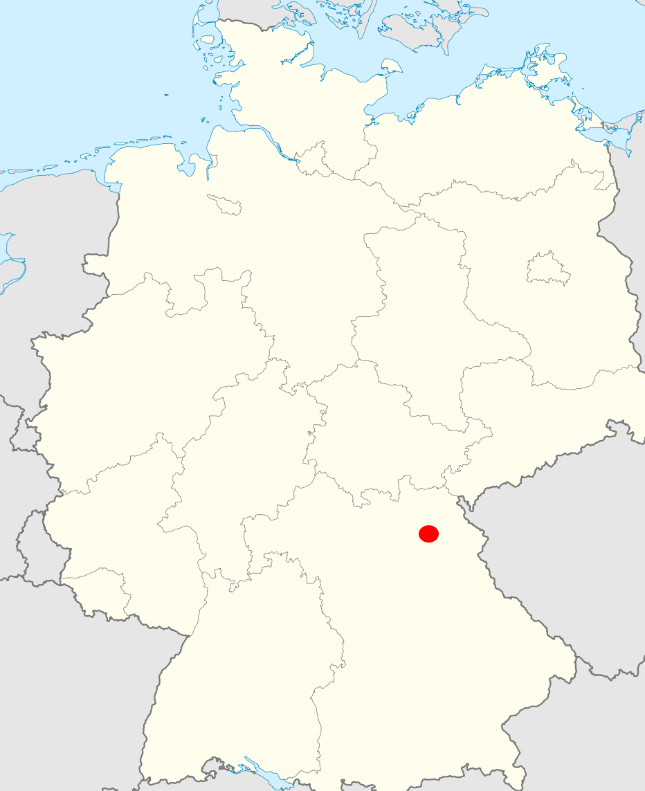 Hier erkennt man die Lage des Hessenreuther Waldes in Deutschland